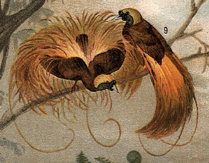 Paradisfågel